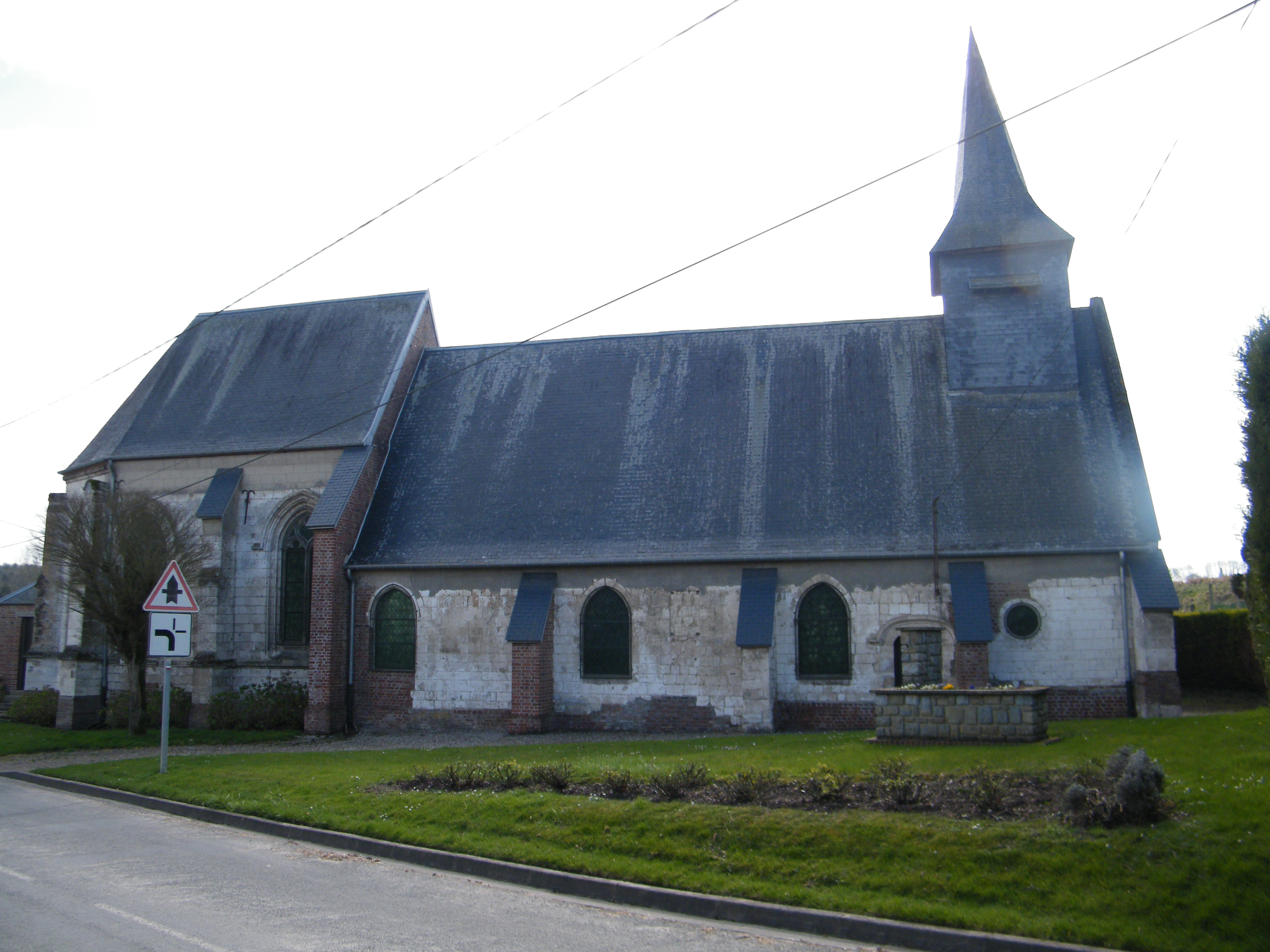 L'église, côté nord.